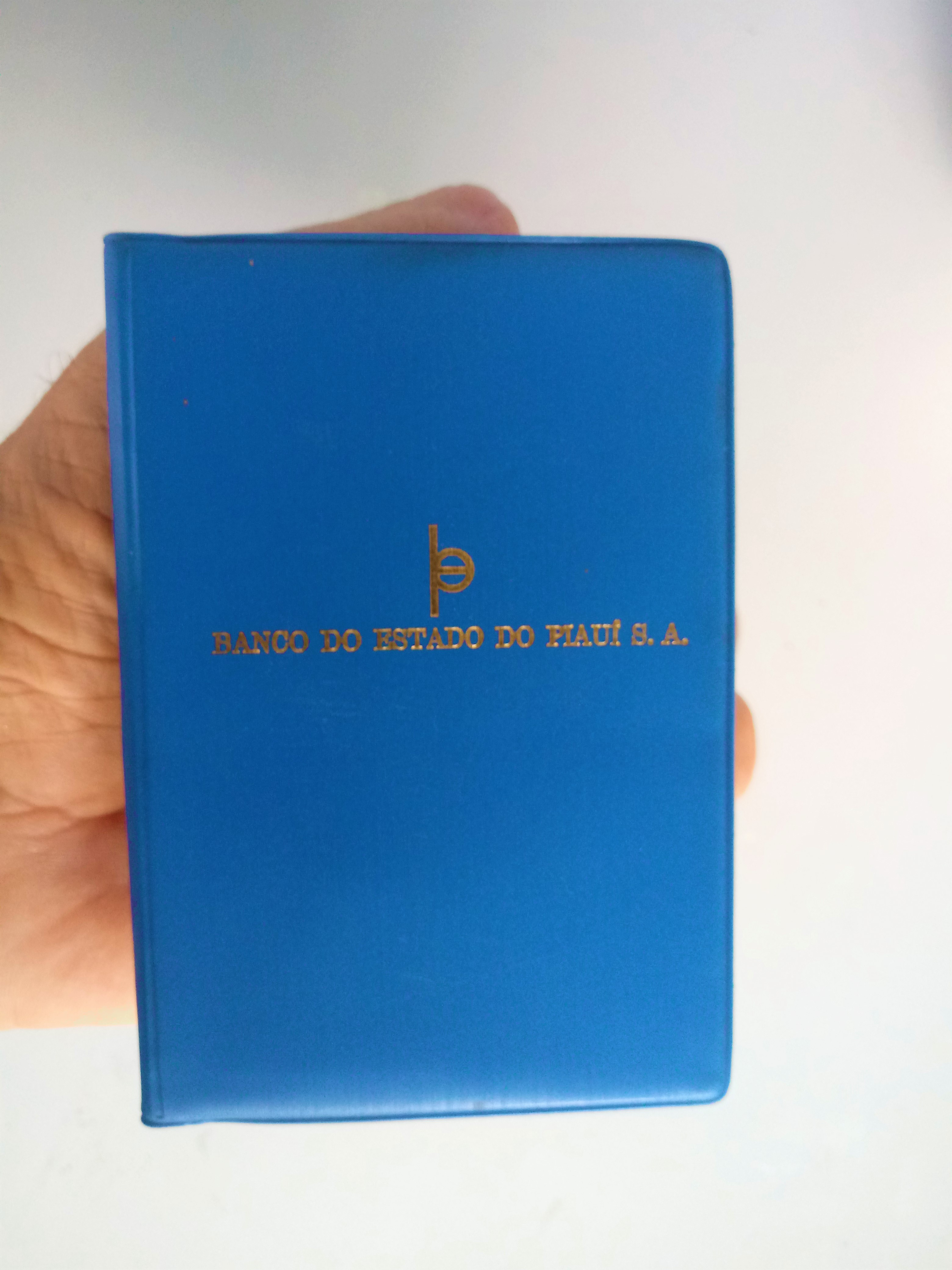 Caderneta do Banco do Estado do Piauí do ano de 1978